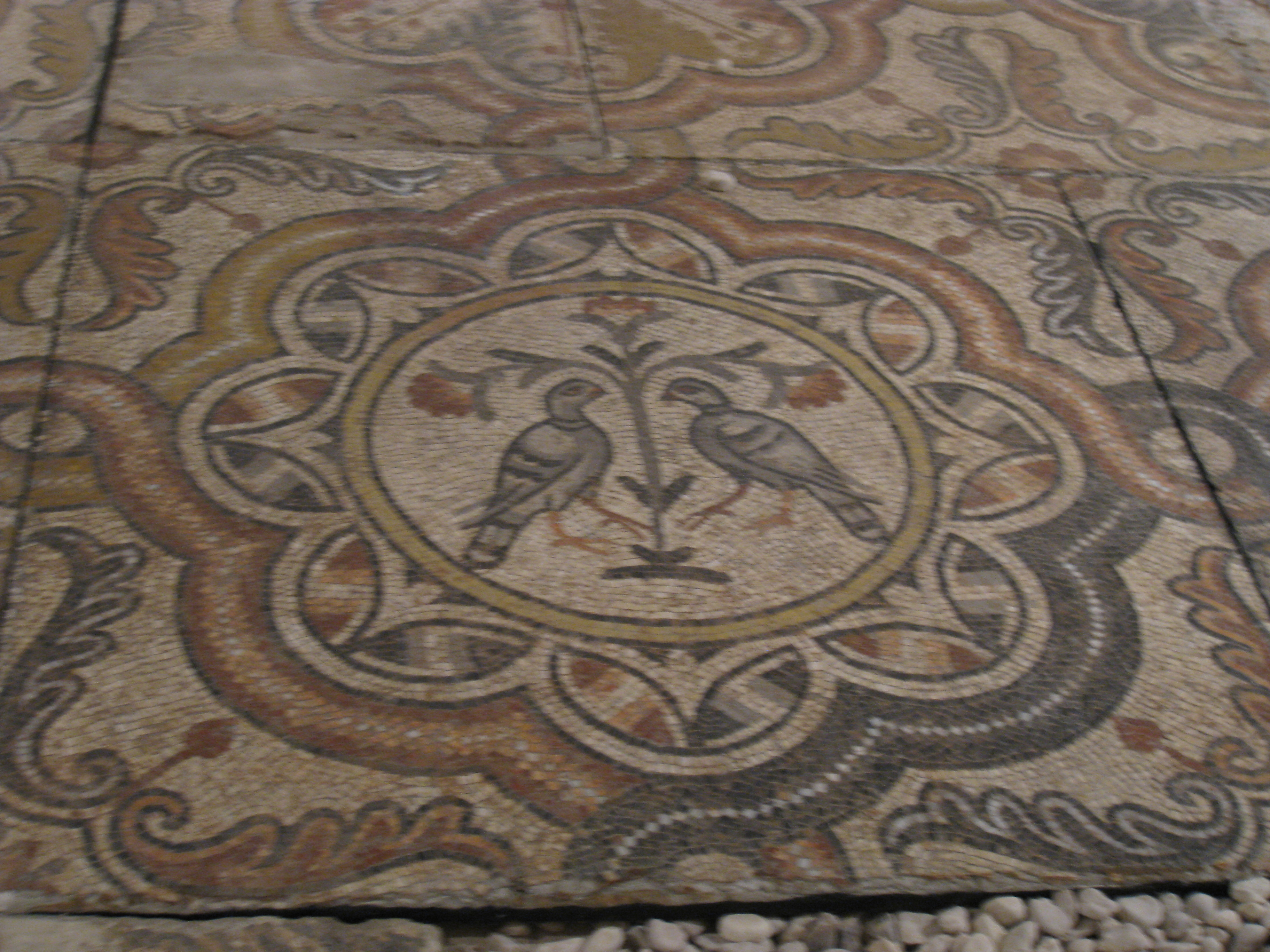 National Maritime Museum, Israel - Mosaic floor, discoved in Shikmona, Byzantine Period, 6th Century CE המוזיאון הימי הלאומי בחיפה רצפת פסיפס. התגלתה בתל שקמונה. התקופה הביזנטית. המאה השישית לספירה